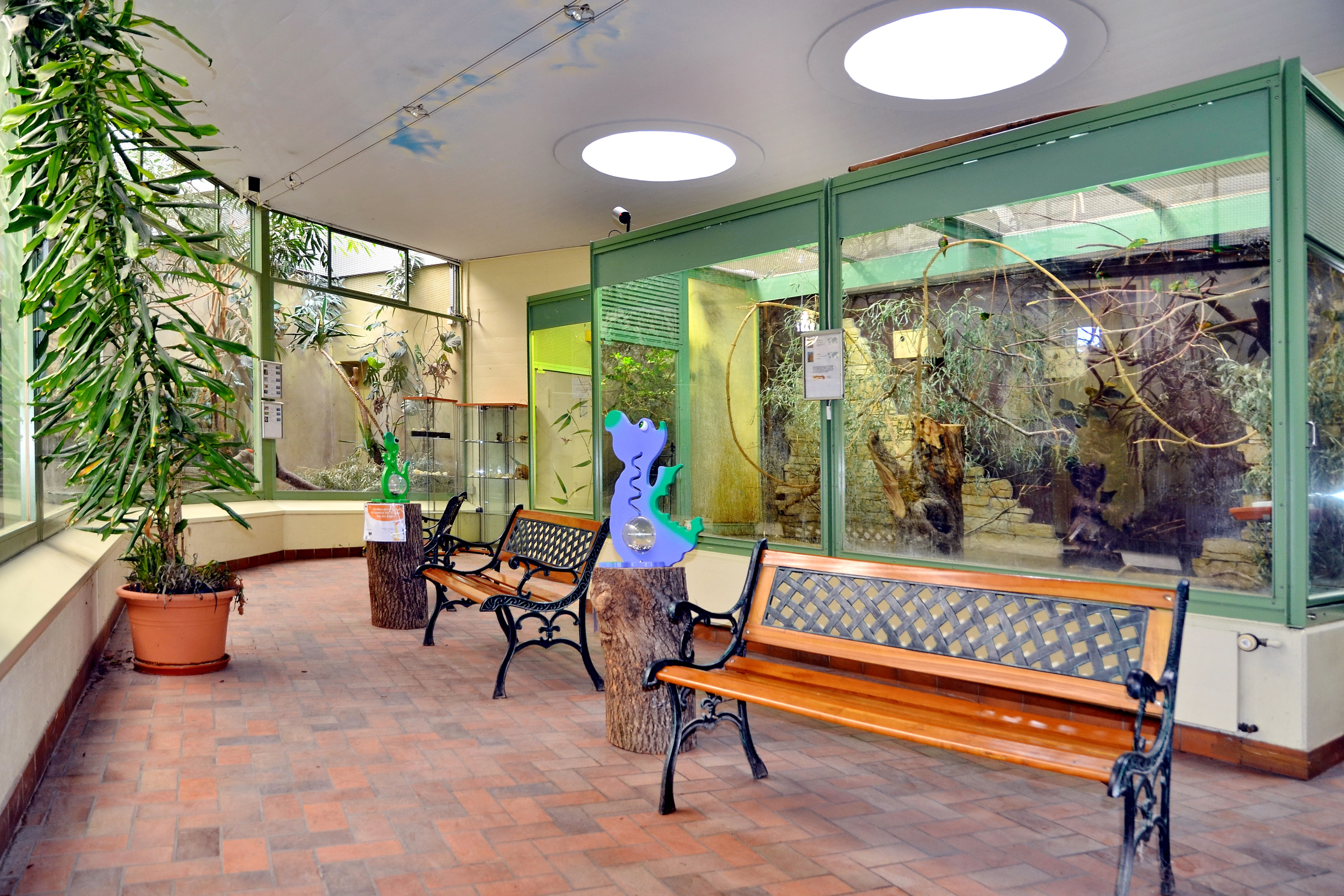 Voliere, Arboretum in Zürich-Enge (Switzerland)